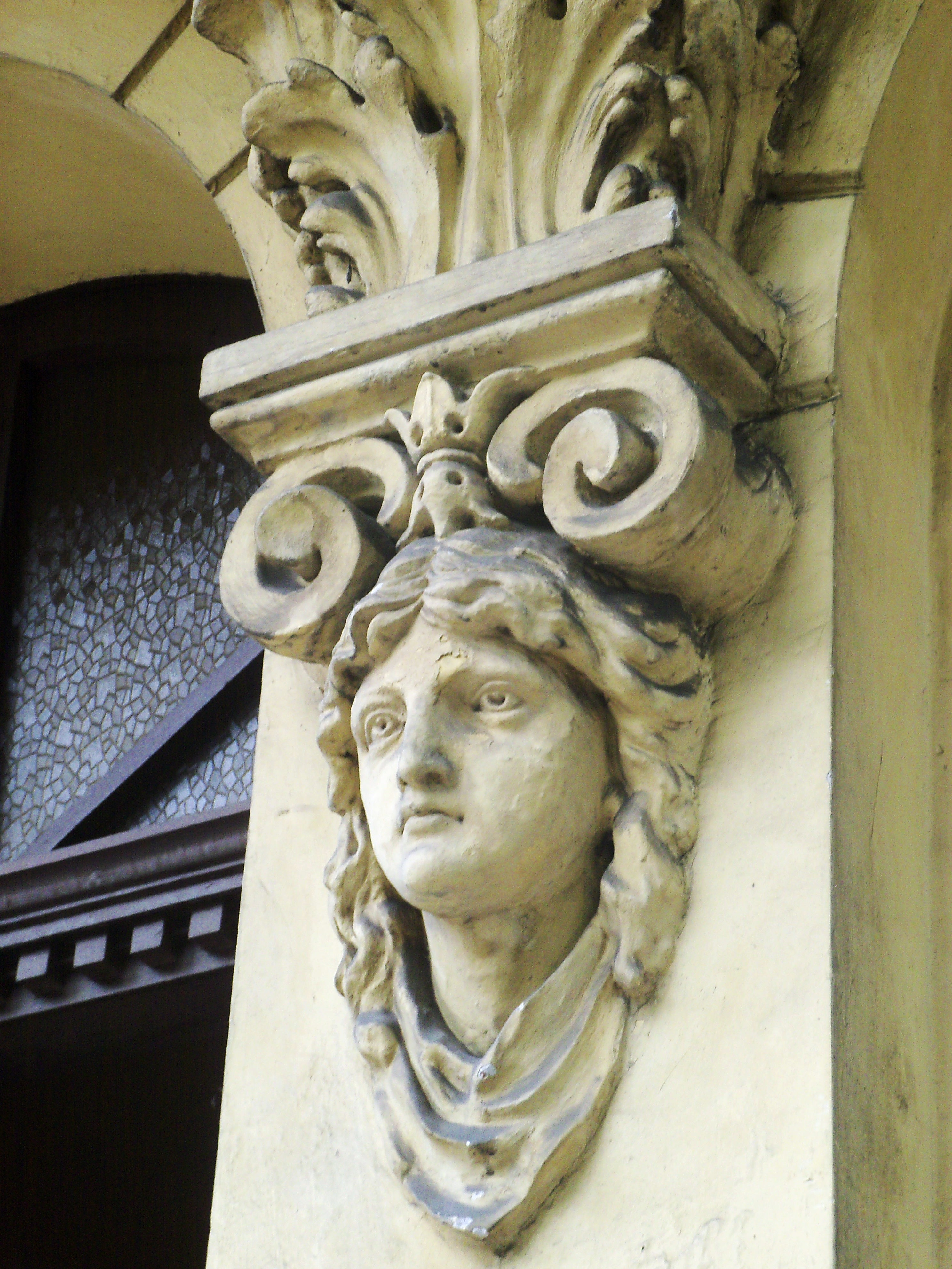 Katowice-Szopienice: ulica ks. bpa Herberta Bednorza - budynek pod numerem 14 (detal)